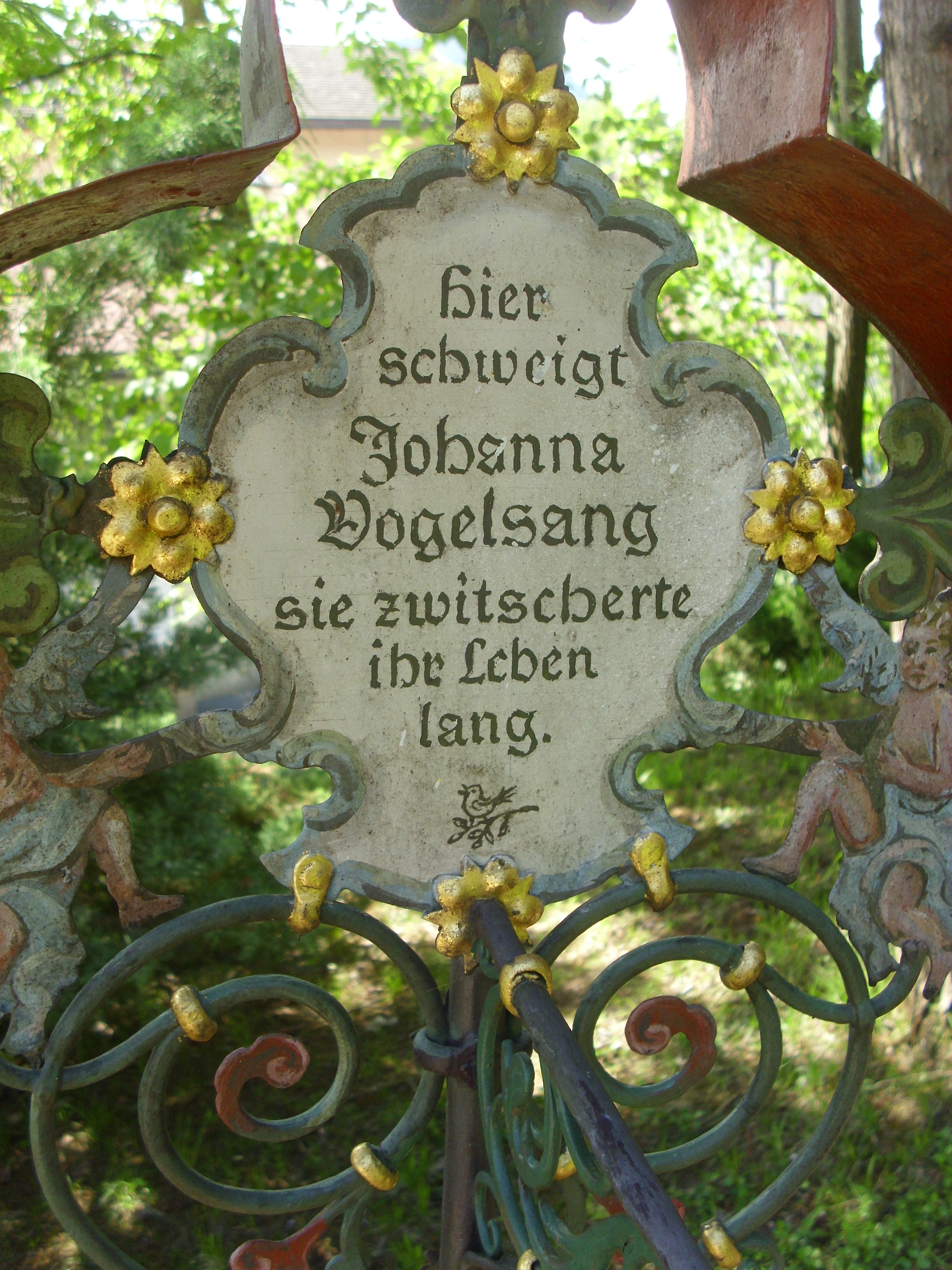 Grabkreuz des Museumsfriedhof in Kramsach